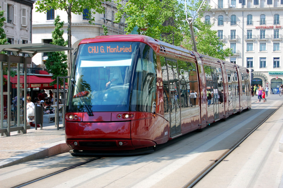 Tramway sur la place de Jaude à Clermont-Ferrand